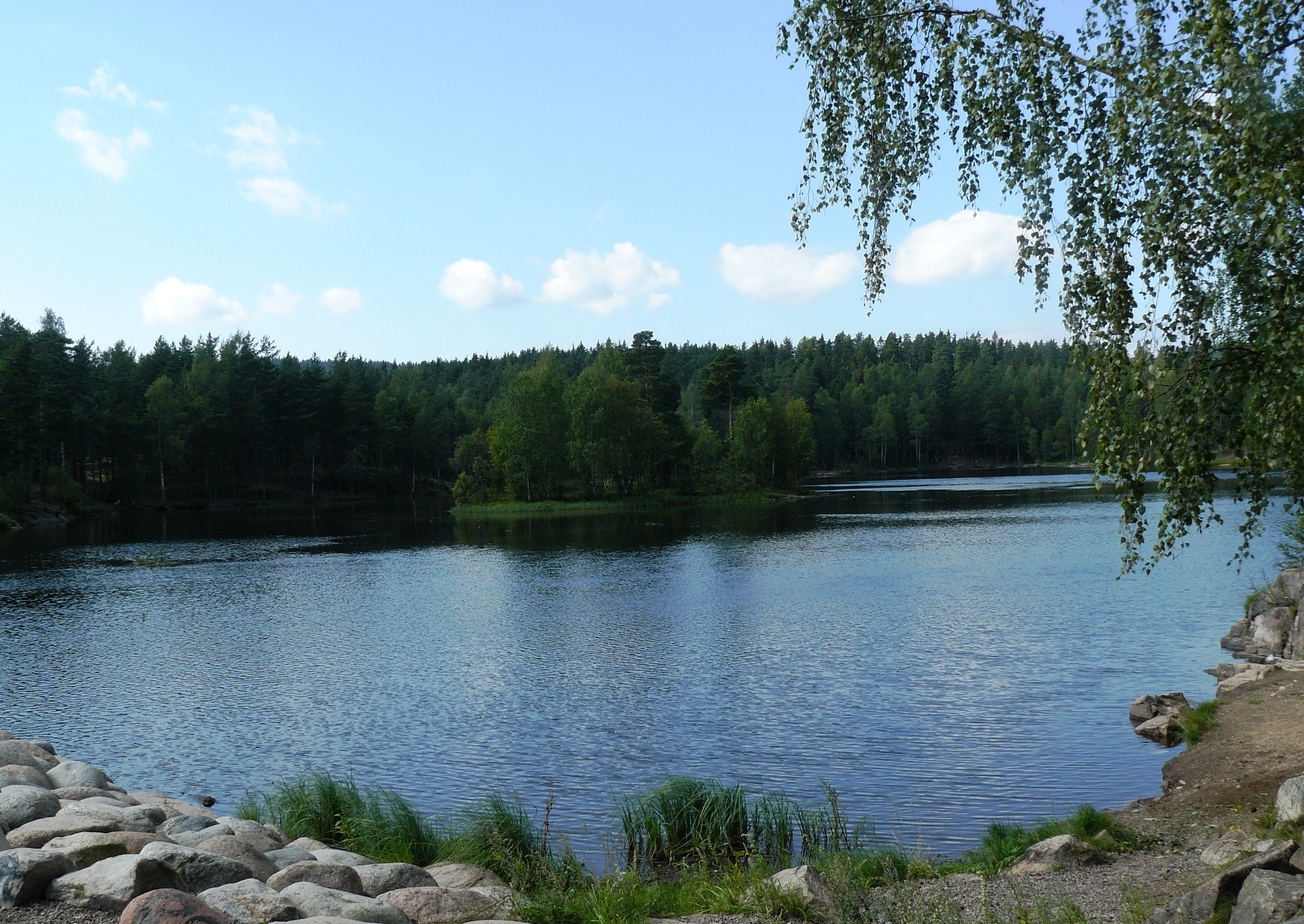 Vesletjern, Ammerud, Oslo